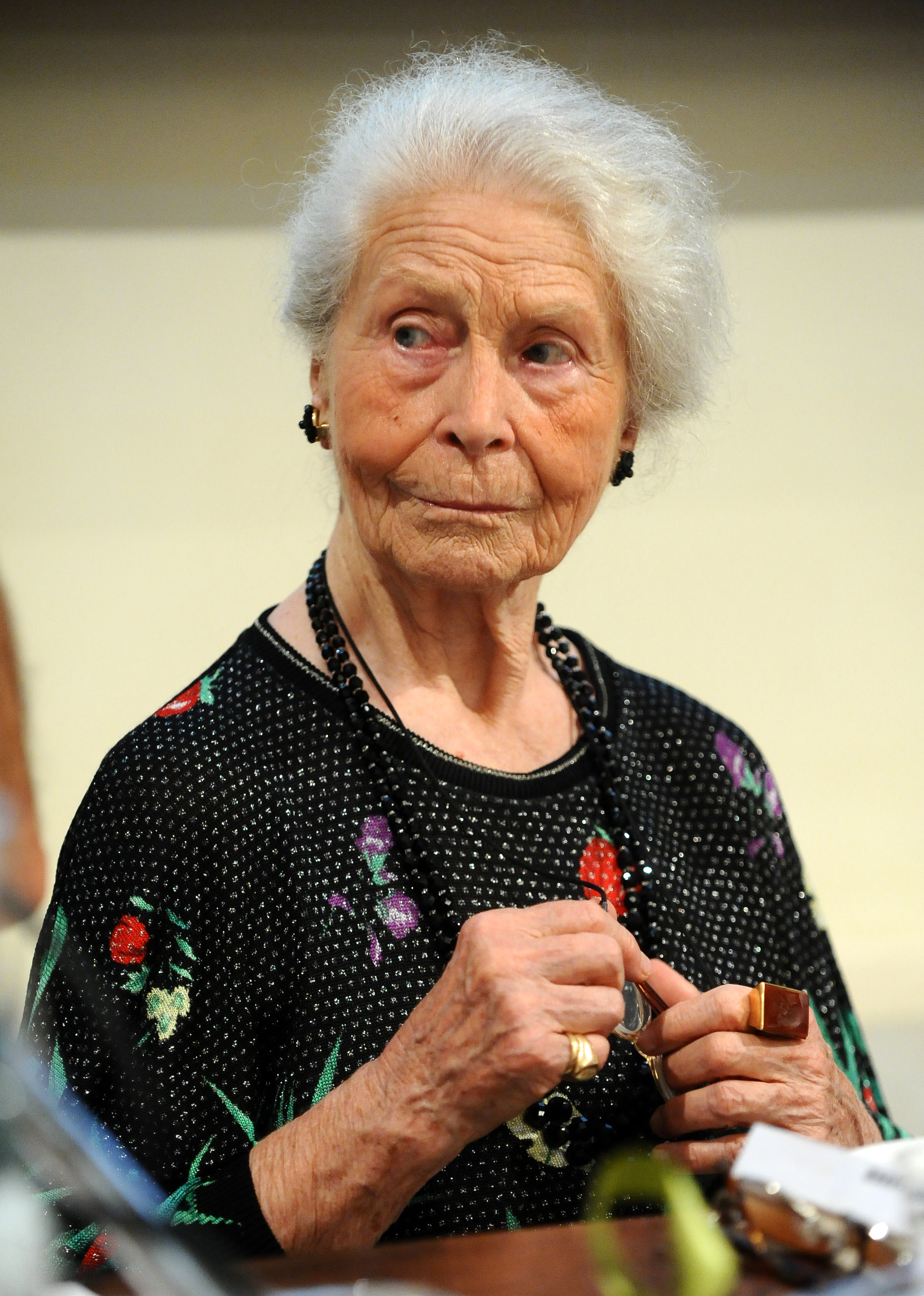 Mary de Rachewiltz a Mantova per il Festivaletteratura 2012.